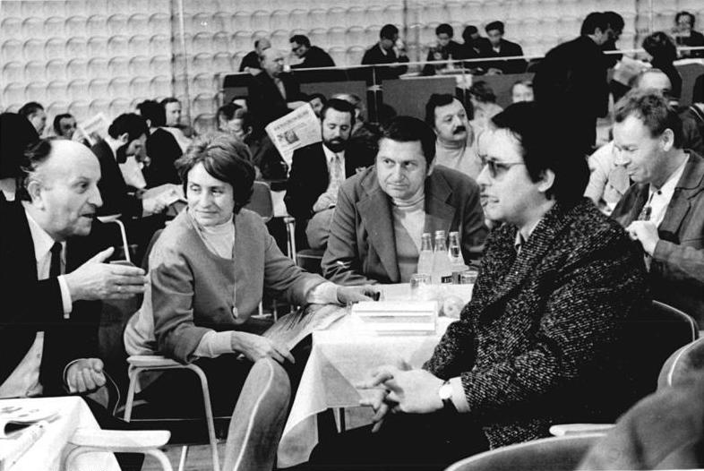 ADN-ZB-Katschorowski-16.11.73-Bau-Berlin: VII. Schriftstellerkongreß - dritter Beratungstag-Gespräch während einer Pause der Vormittagssitzung des Schriftstellerverbandes der DDR am 16.11.73 zwischen den Schriftstellern Paul Herbert Freyer, Ruth Kraft, Heinz Knobloch und Eckart Krumbholz (v.l.n.r.).